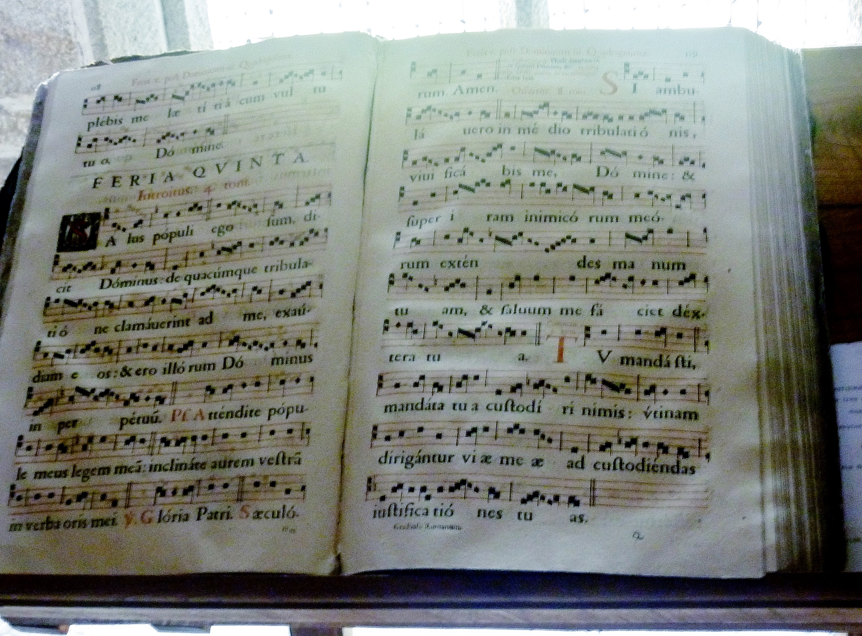 Château de Kérouzéré, antiphonaire du bréviaire romain ("Antiphonaire du bréviaire romain selon les prescriptions du très saint décret du concile de Trente sous l'autorité reconnue des souverains pontifes Pie V et Clément VIII ; à Lutèce des Parisiens, Fête de la bienheureuse nativité de Marie, 1670 avec approbation"